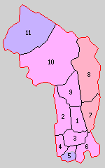 佐賀県神埼郡の町村制時点の町村。